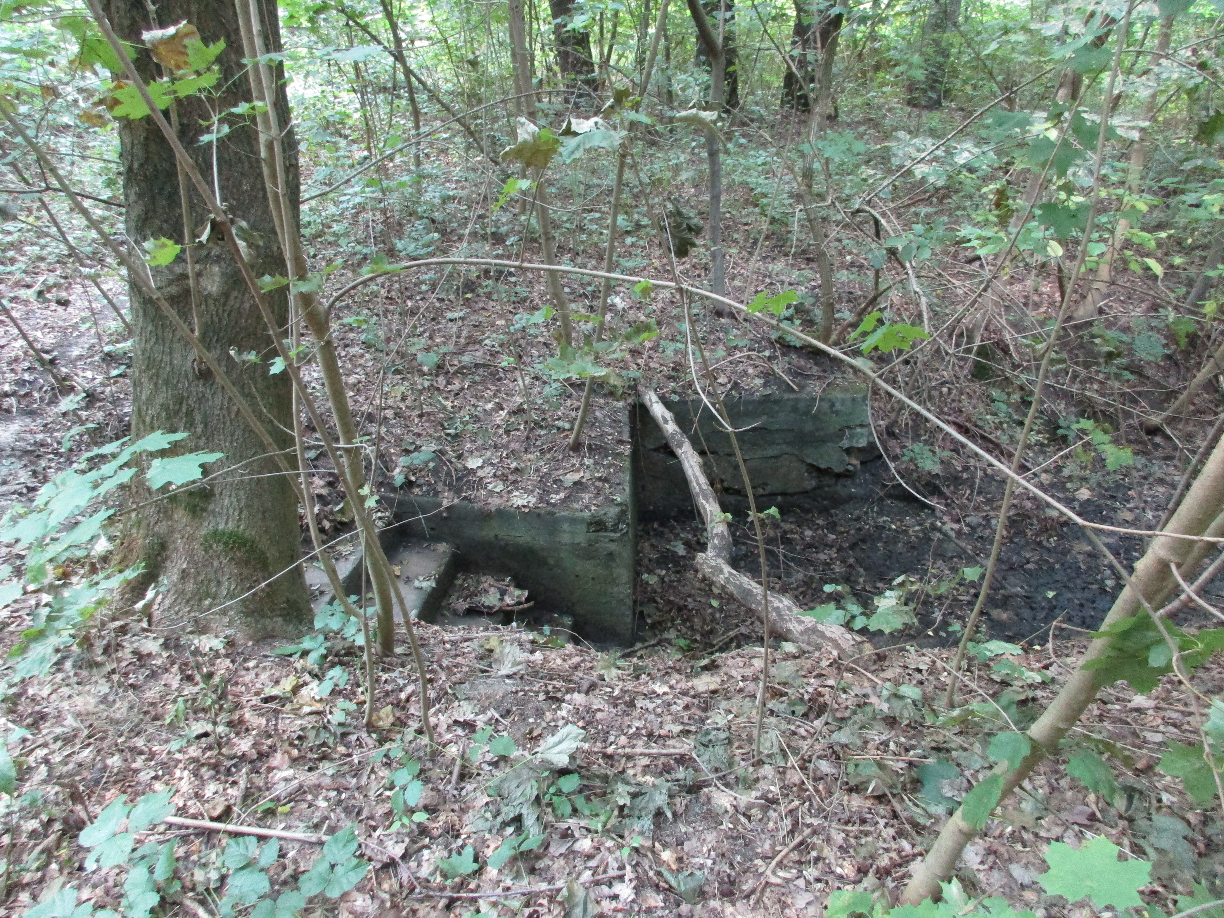 Lesní divadlo, Praha 4-Krč, Nad Lesním divadlem. Pozůstatky staveb.